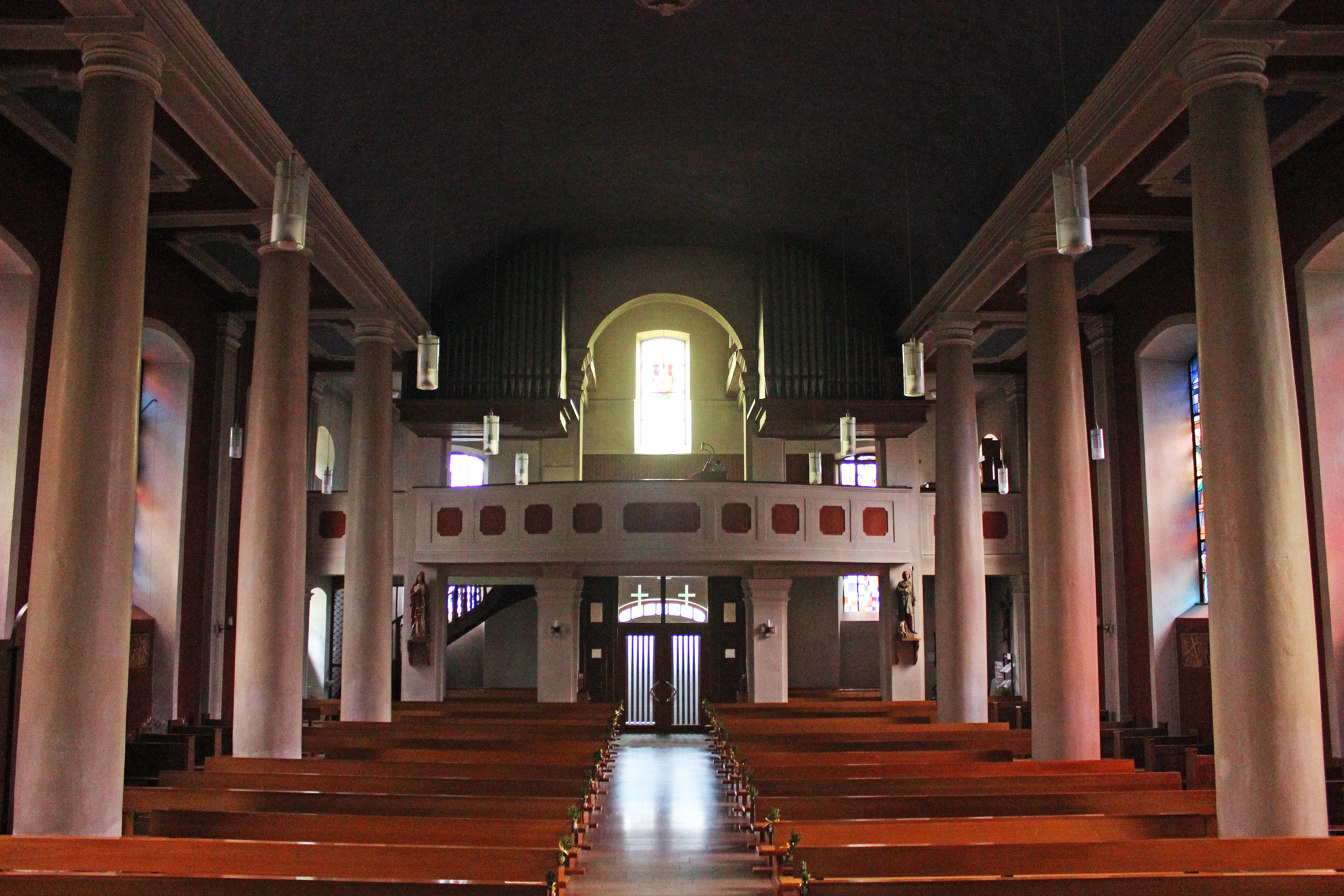 Blick ins Innere der katholischen Pfarrkirche St. Laurentius in Welschbach, einem Ortsteil der Gemeinde Illingen, Landkreis Neunkirchen, Saarland